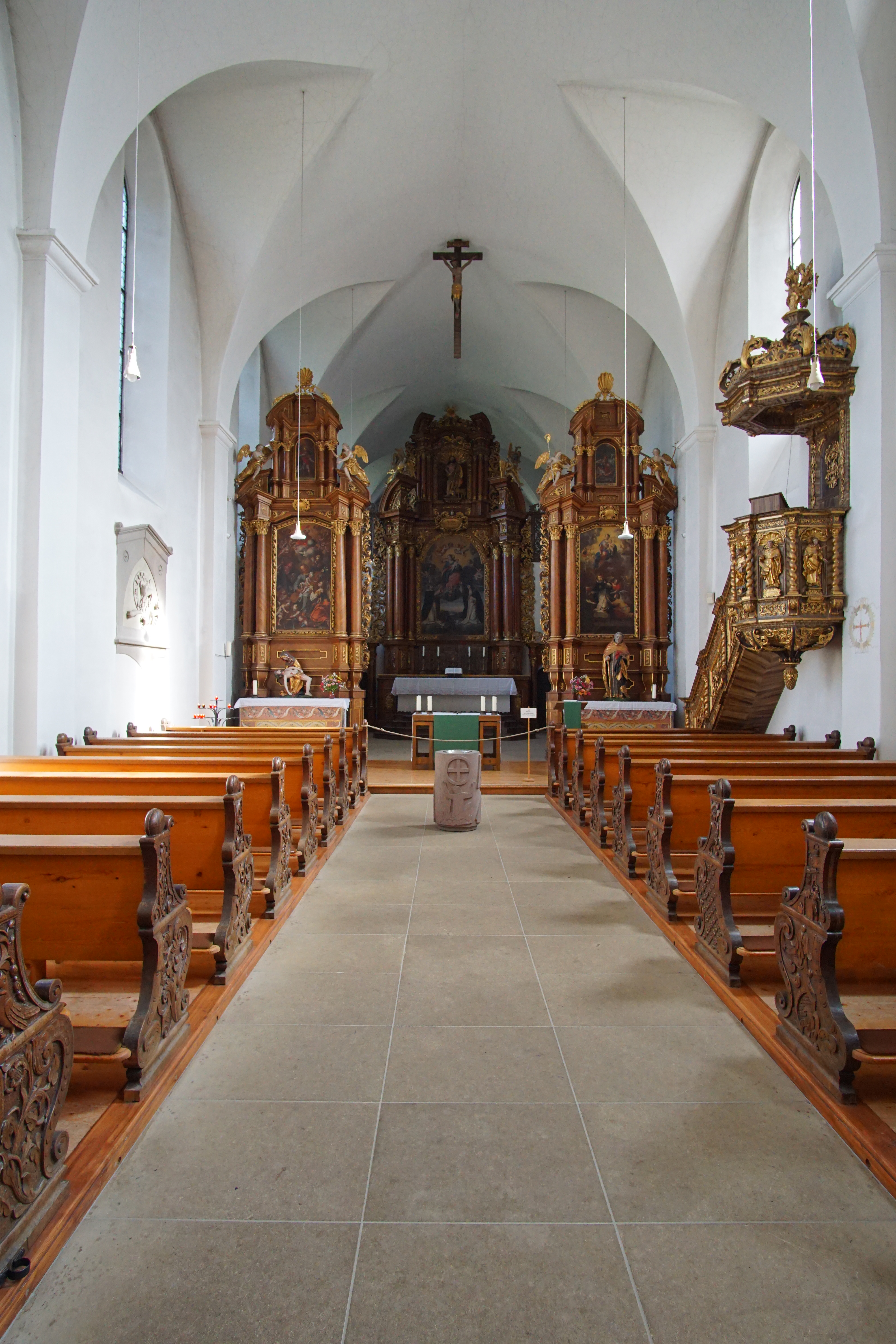 Klosterkirche des Klosters Kirchberg.